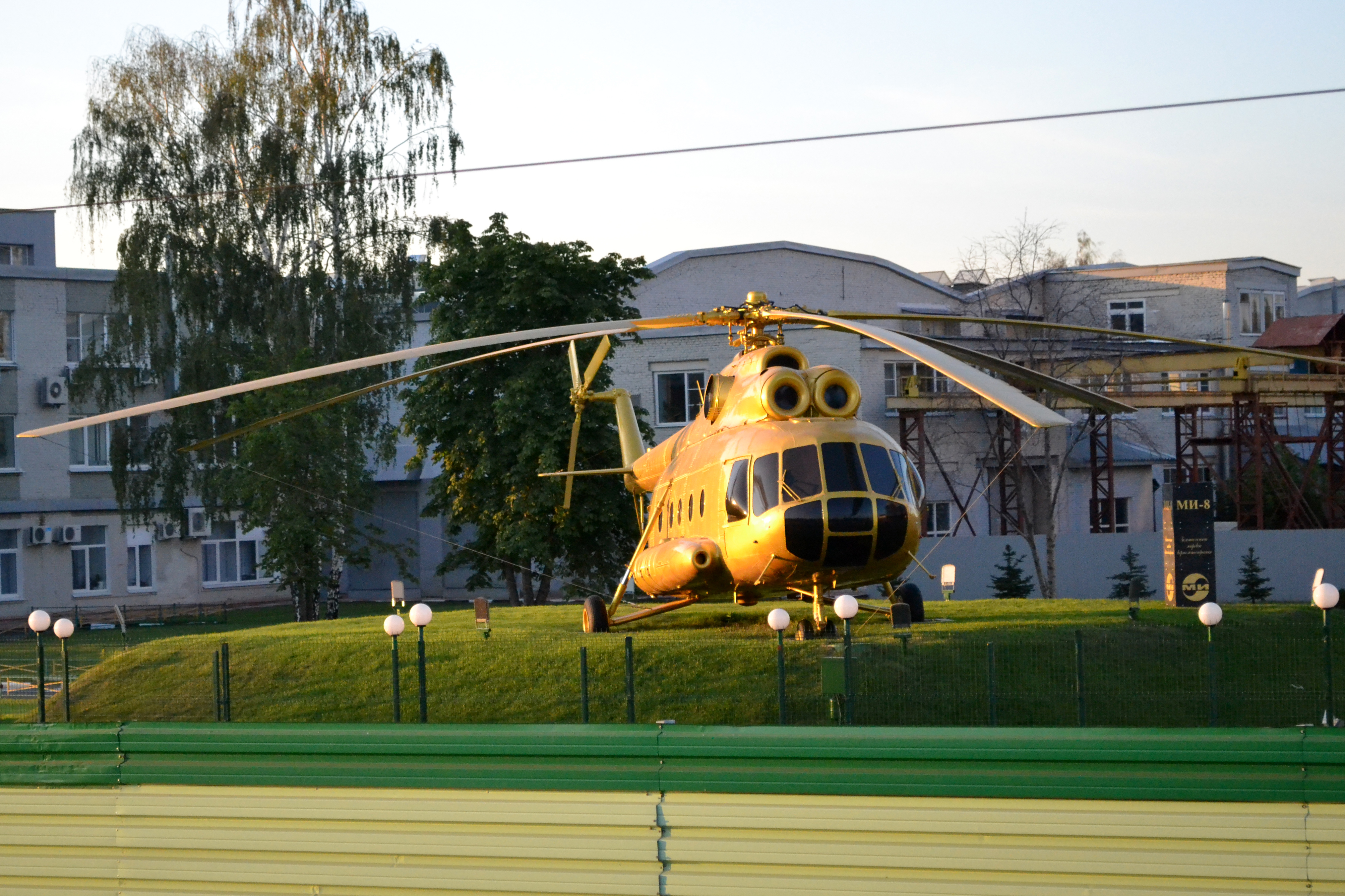 Памятник вертолёту Ми-8